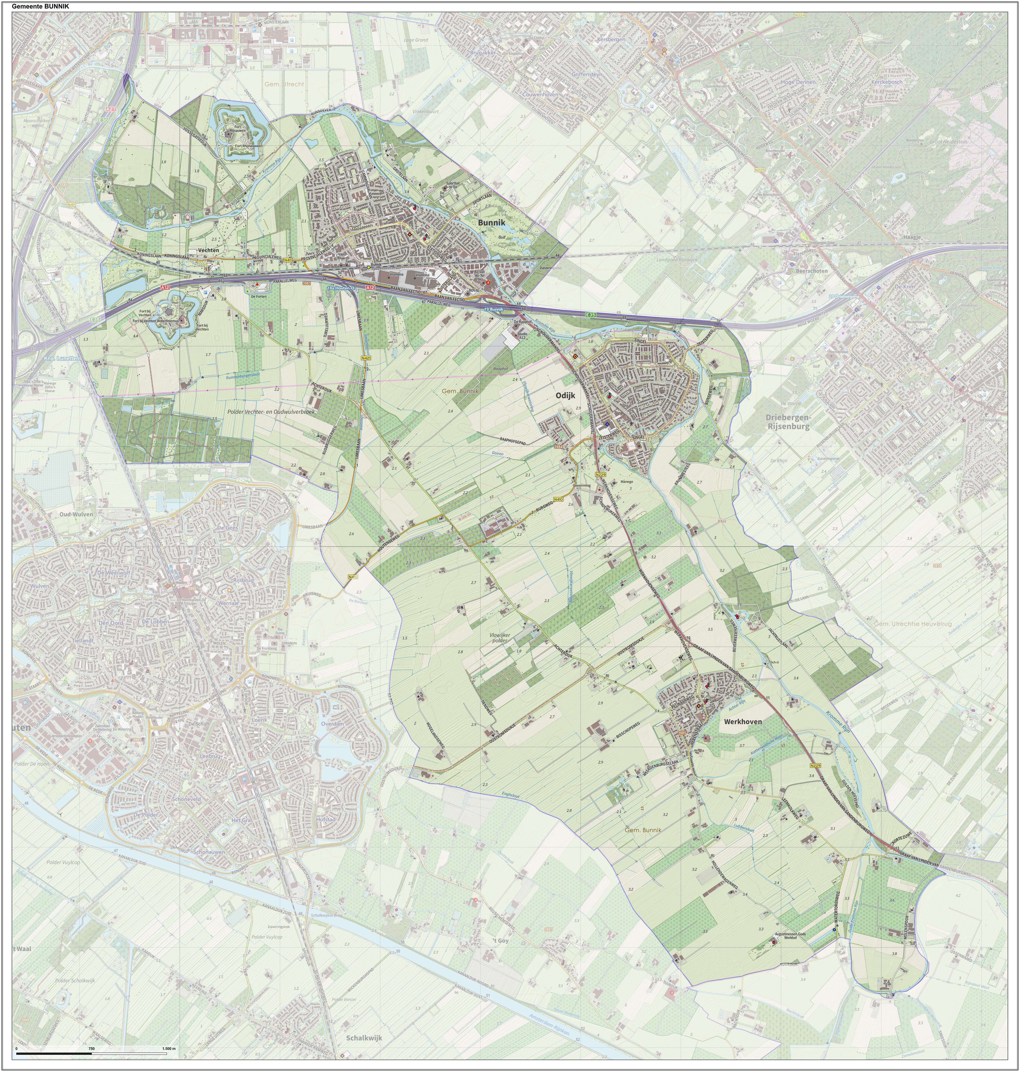 Topografische gemeentekaart. Resolutie: 400 pixels/km. Kaartbeeld samengesteld uit de open geodata van de Top10NL en Top25namen (Kadaster), Creative Commons-BY licentie. Gebouwvlakken uit open geodata BAG extract. Wegen uit de OpenStreetMap, OpenStreetMap community. Reliëfschaduw uit de Actuele Hoogtekaart AHN2. Samenstelling en kleurenschema: Jan-Willem van Aalst, met QGIS. Zie ook de Legenda.